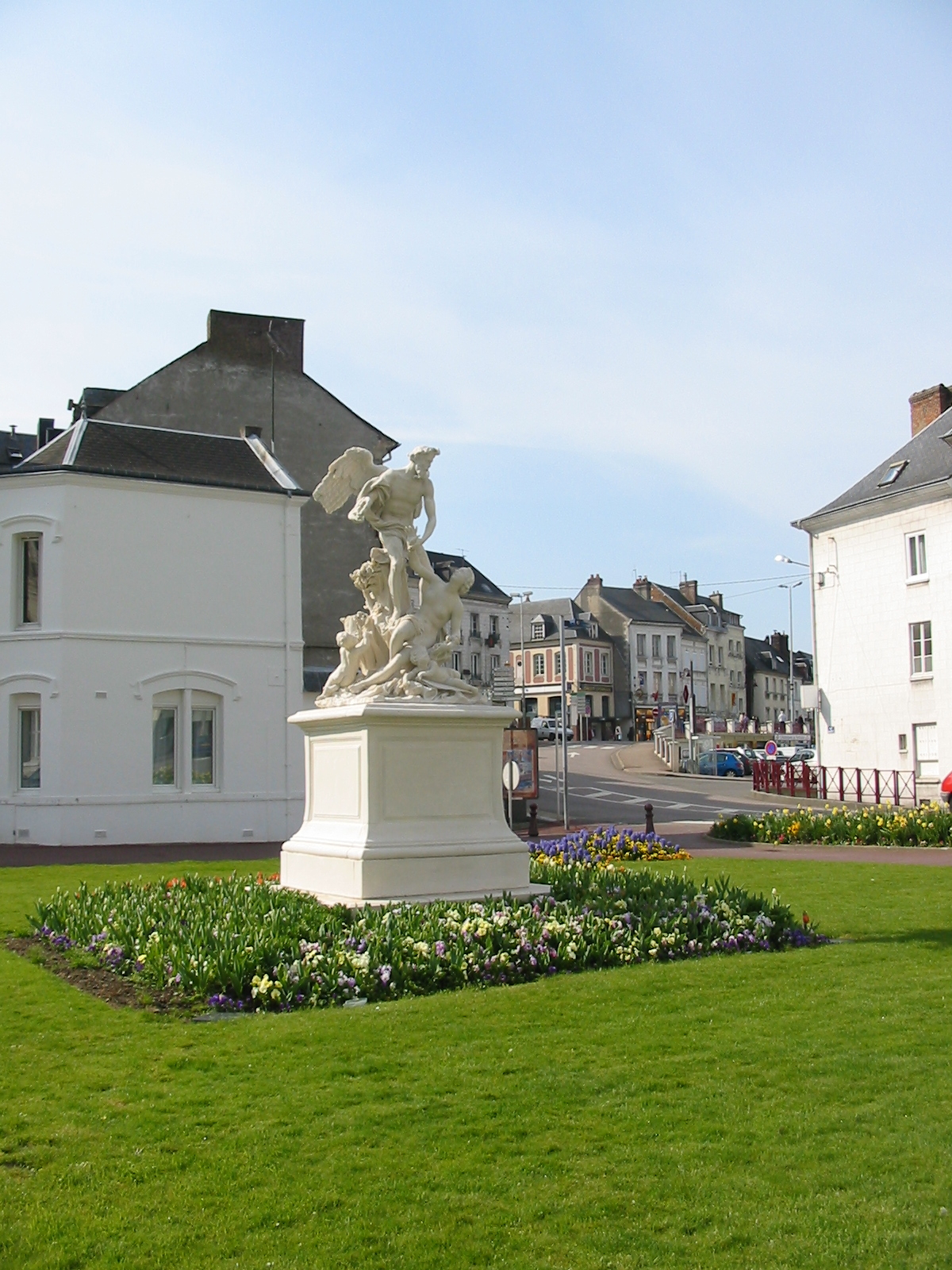 Statue de Bolbec